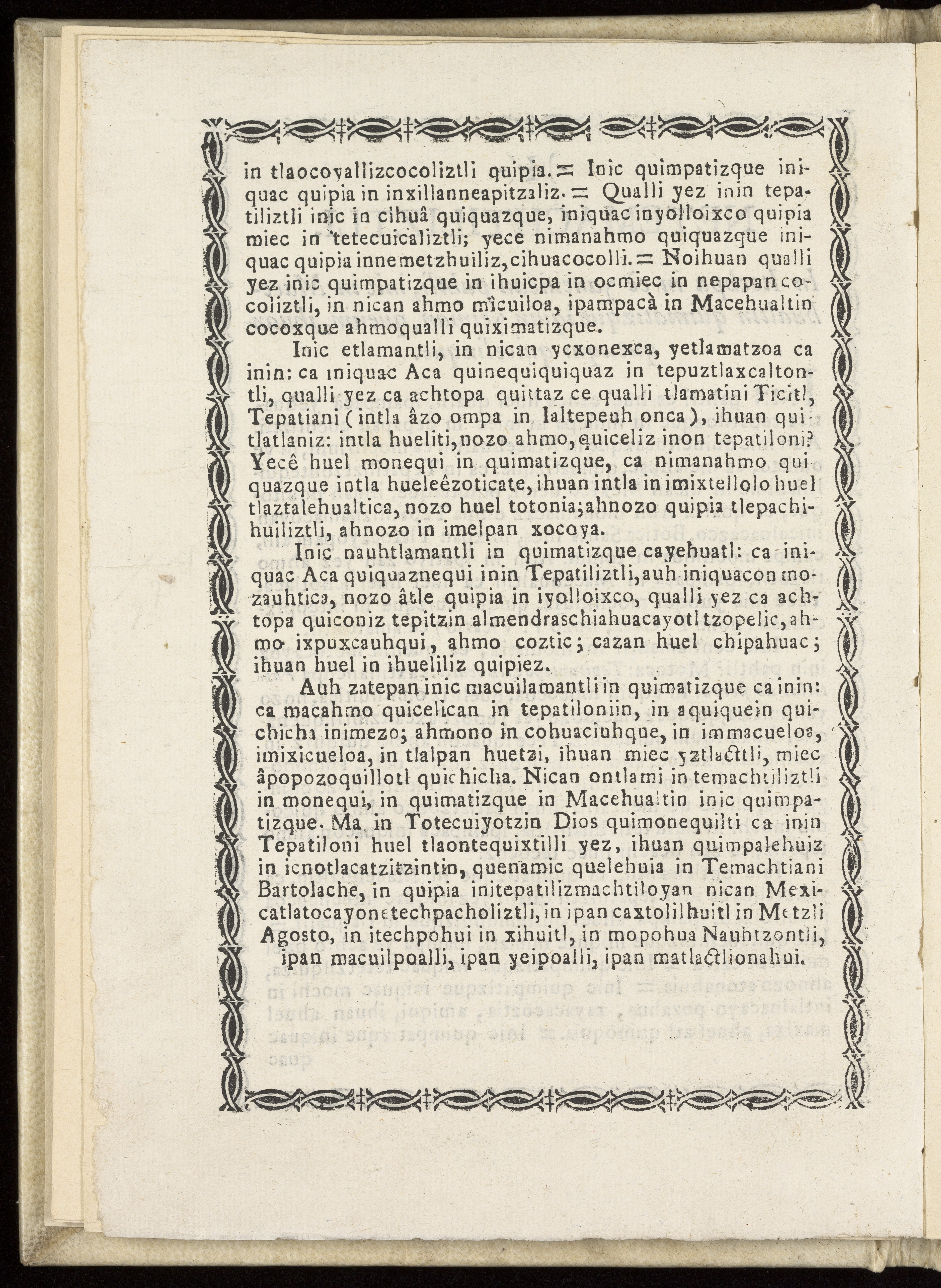 Jose Ignacio Bartolache : Netemachtiliztli. In Itechpa in cè yancuican pahtli, inic in Macehualtin quimatizque iquin yeiman, quenin, ihuan quezqui quicelizque. Translation into the Aztec language, Nahuatl, of: Instruccion para el buen uso de las pastillas marciales ó fierro sutíl, published in Mexico, 1774. Rare Books